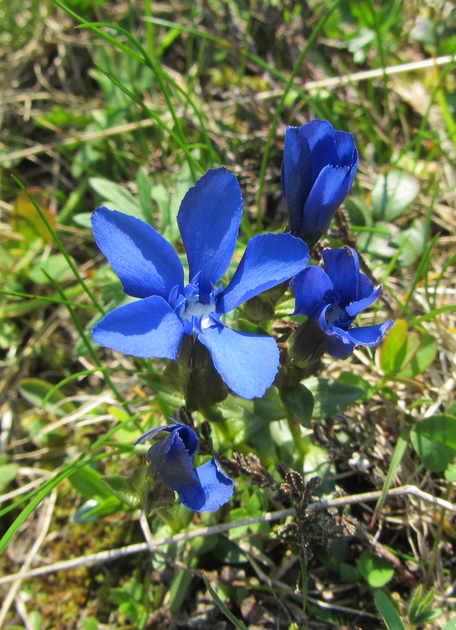 Frühlings-Enzian-Blüte